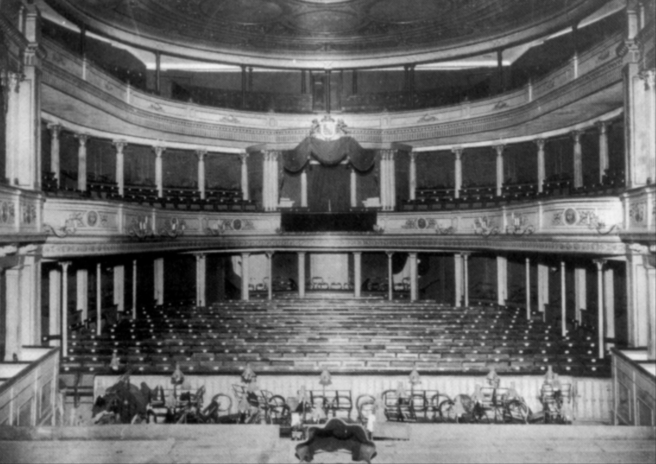 Hoftheater Weimar, vor 1907: Blick in den Zuschauerraum